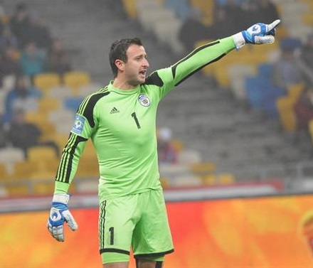 Александр Надь в матче против Динамо Киев